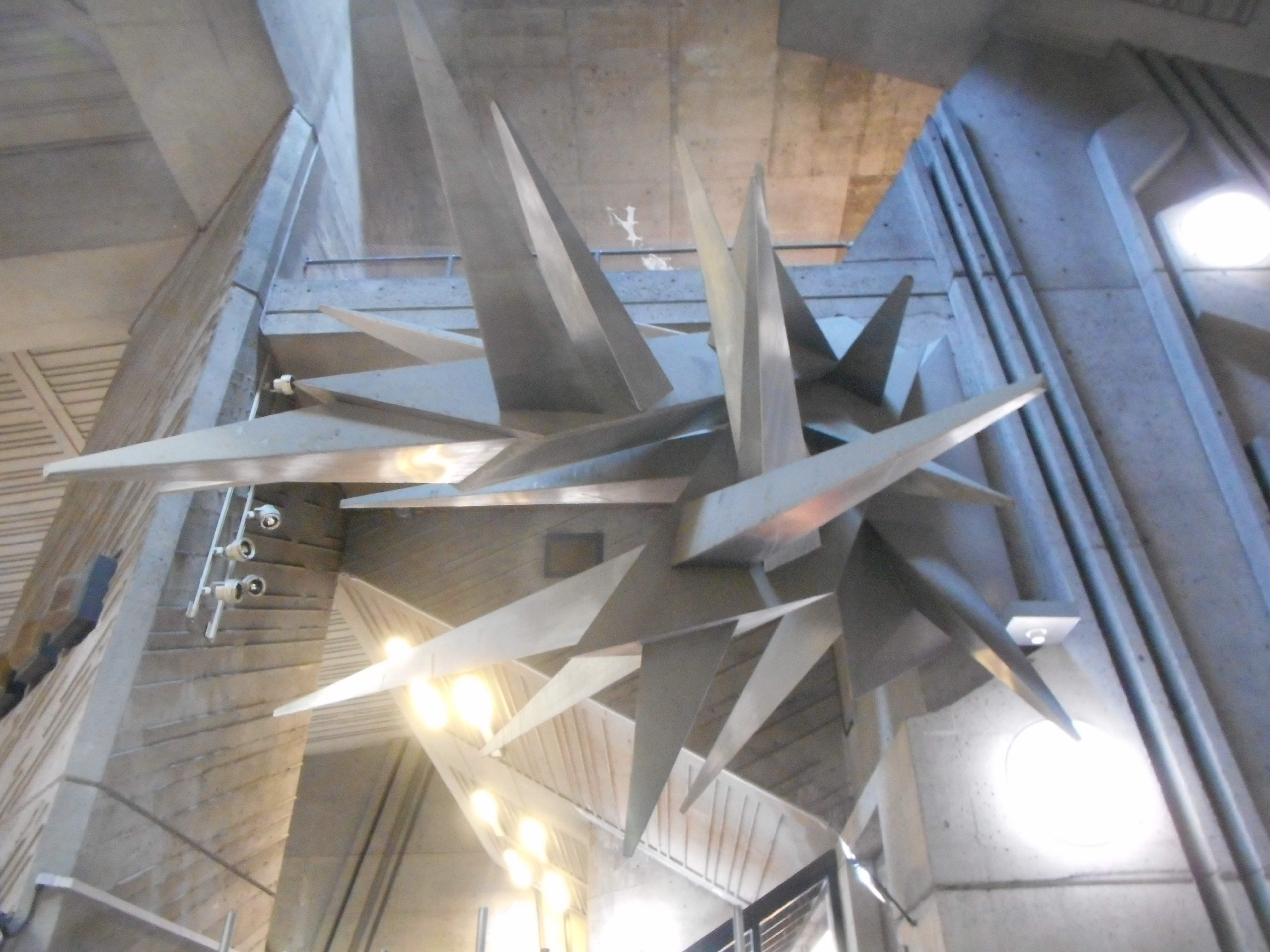 Calcite de Maurice Lemieux, 1984 Station de métro De la Savane, Montréal